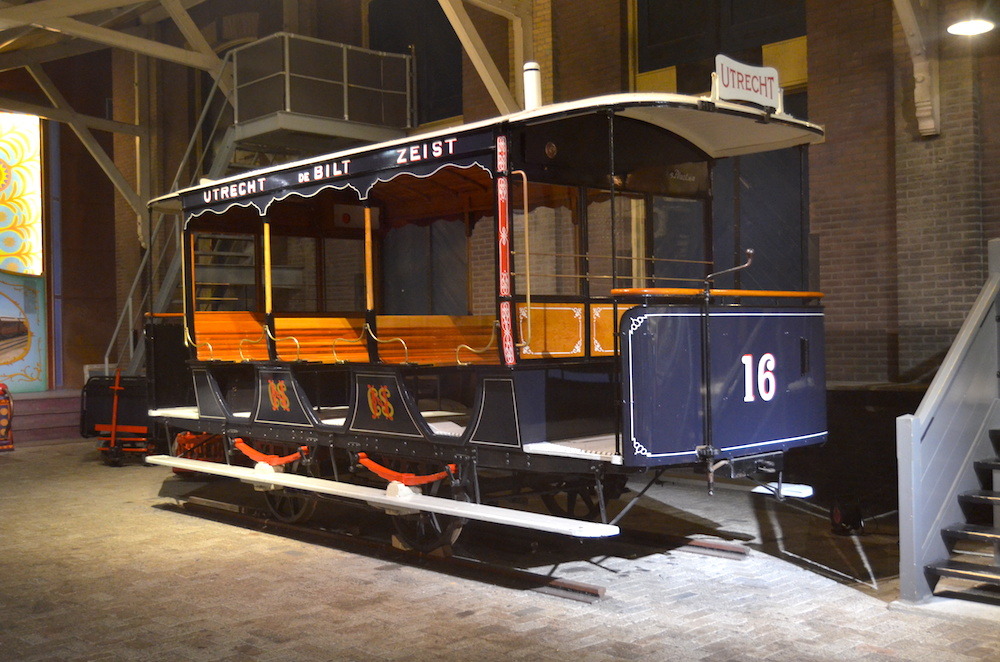 Nederlands Spoorwegmuseum paardentramrijtuig STM 16. Foto: Erik Swierstra.